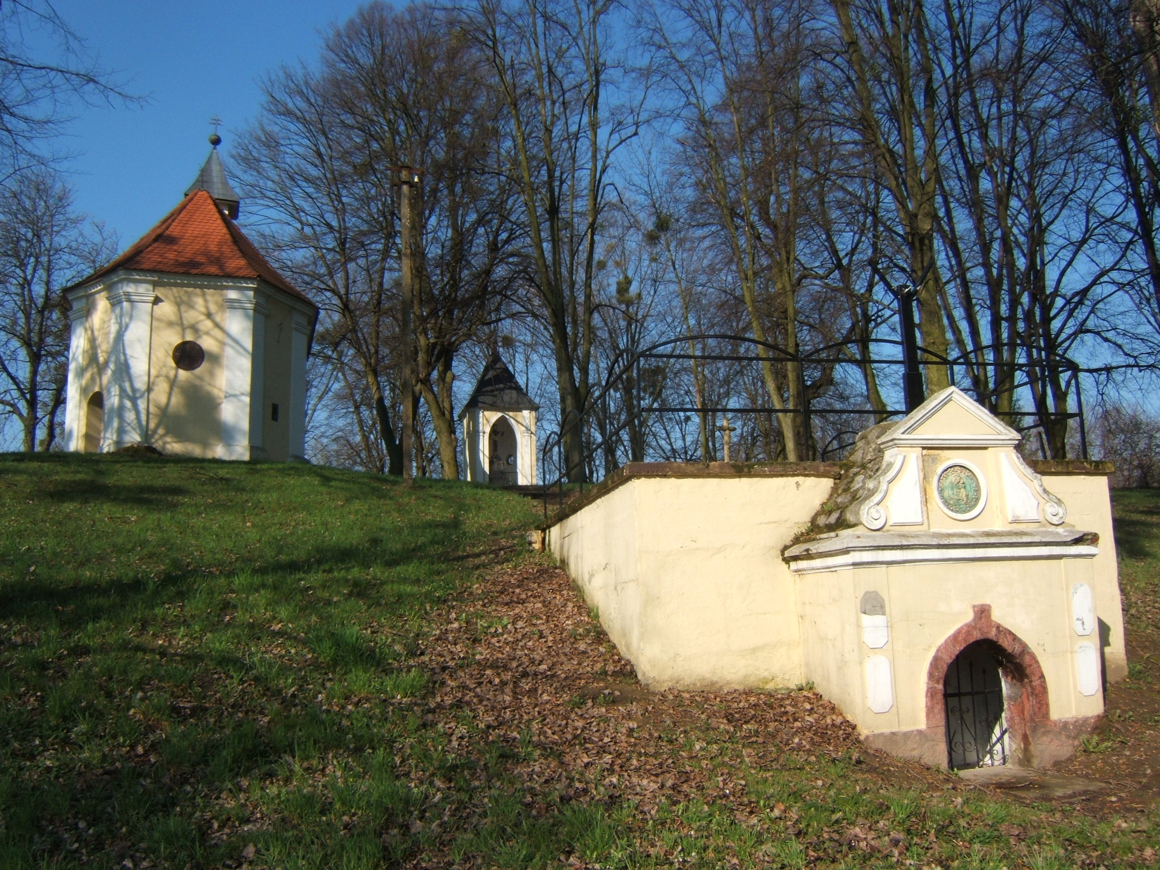 Szentkút és Római katolikus kápolna, barokk, 18. sz. Tornya 20. sz.-i. Berendezés: oltár, barokk, 18. sz. azonosító: 8065 (törzsszám: 4554) - Somogy m., Segesd, Alsósegesd Dózsa tér